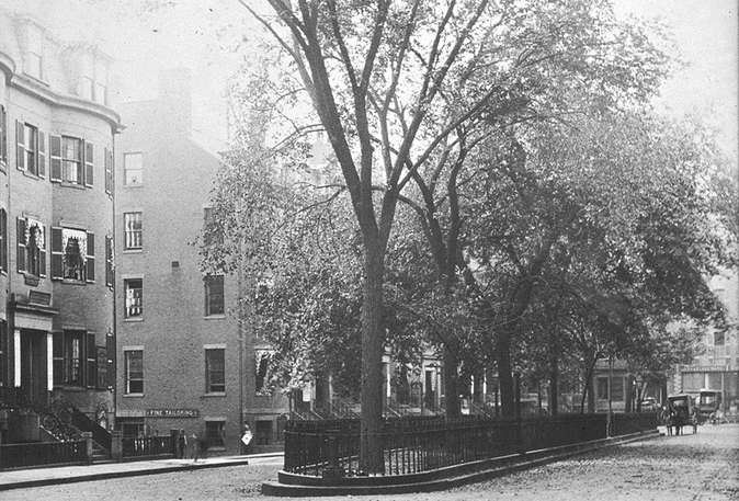 Boston, Massachusetts